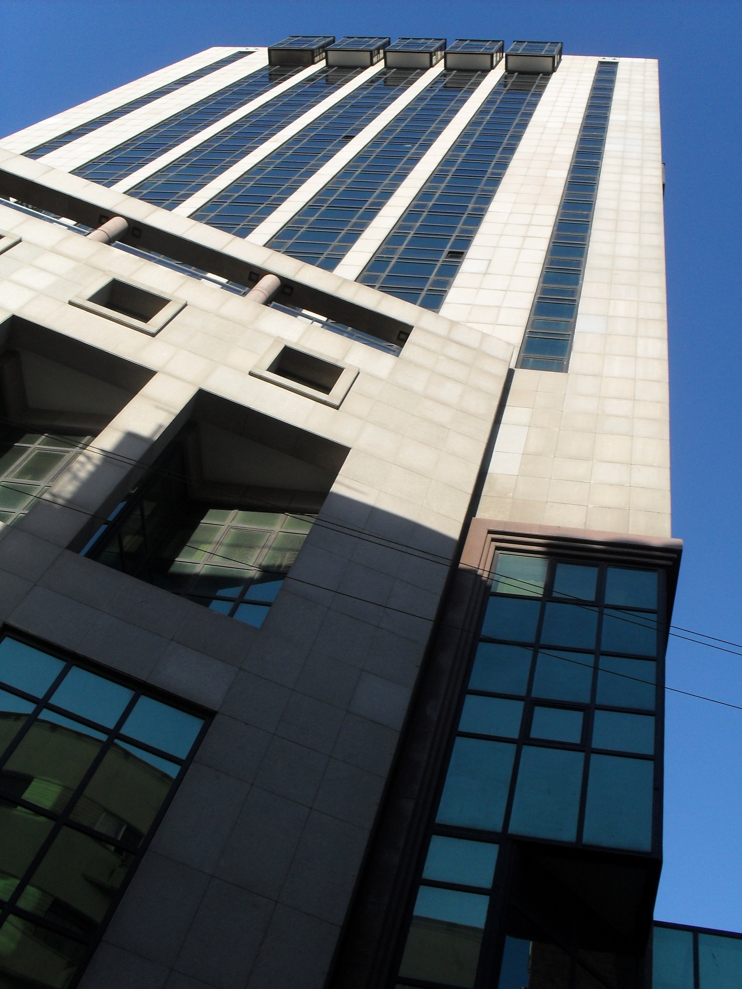 Hotel 5 estrellas en estratégico lugar de Montevideo.